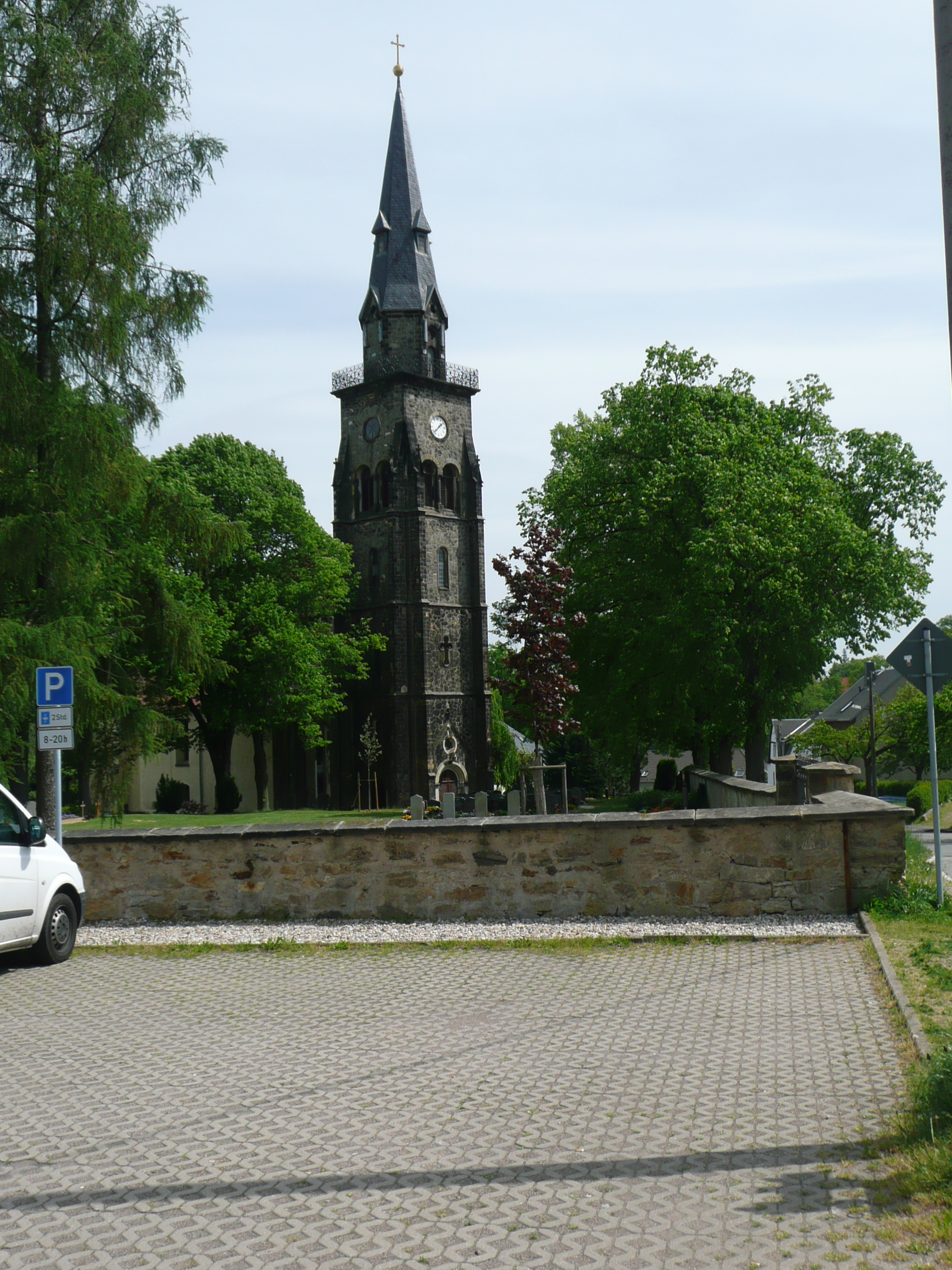 Ansicht der Kirche von Mohorn